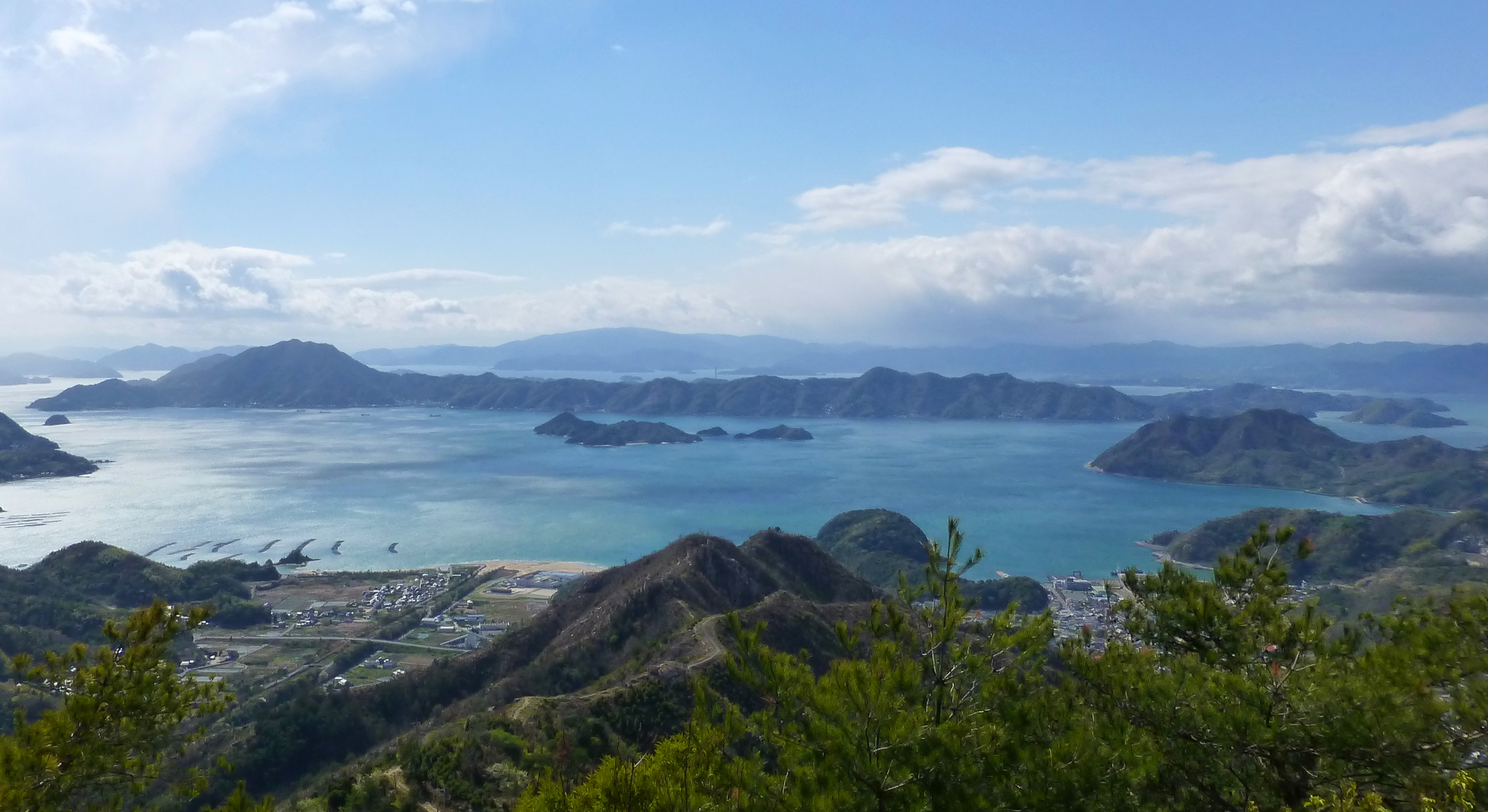 大崎上島